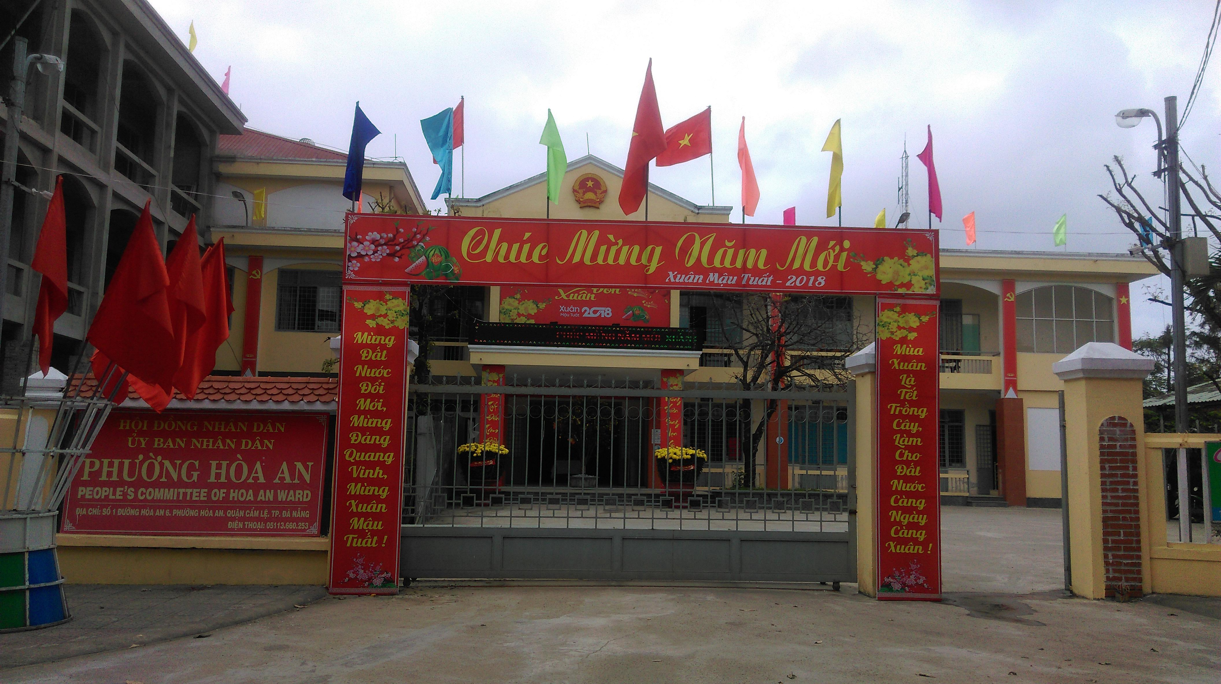 UBND phường Hòa An, Cẩm Lệ, Đà Nẵng